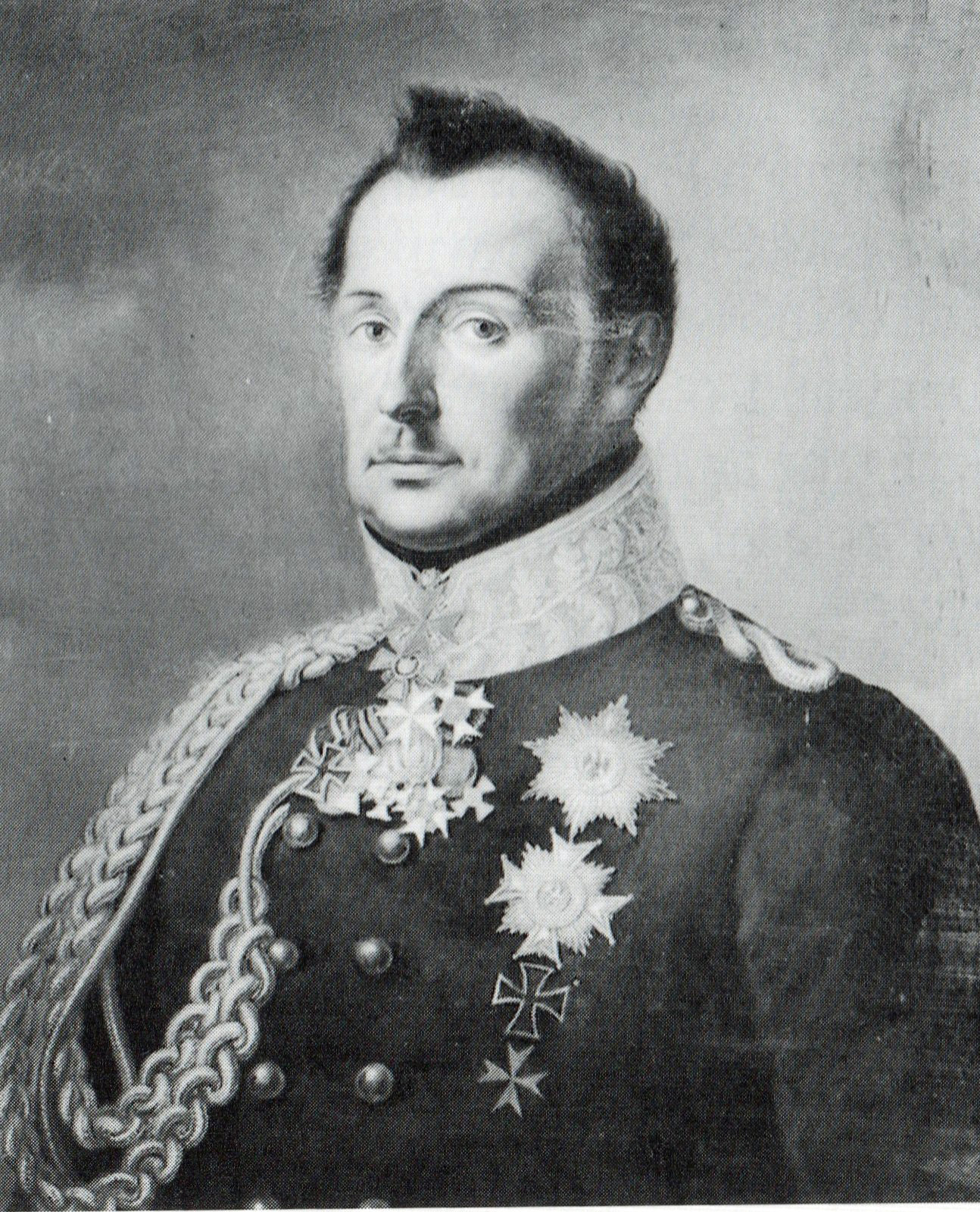 Ölgemälde von Gebhard von Alvensleben, früher im Schloß Königsberg.